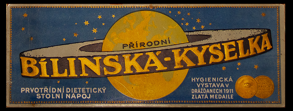 Reklamní cedule ku příležitostí získání zlaté medaile na hygienické výstavě Drážďany 1911